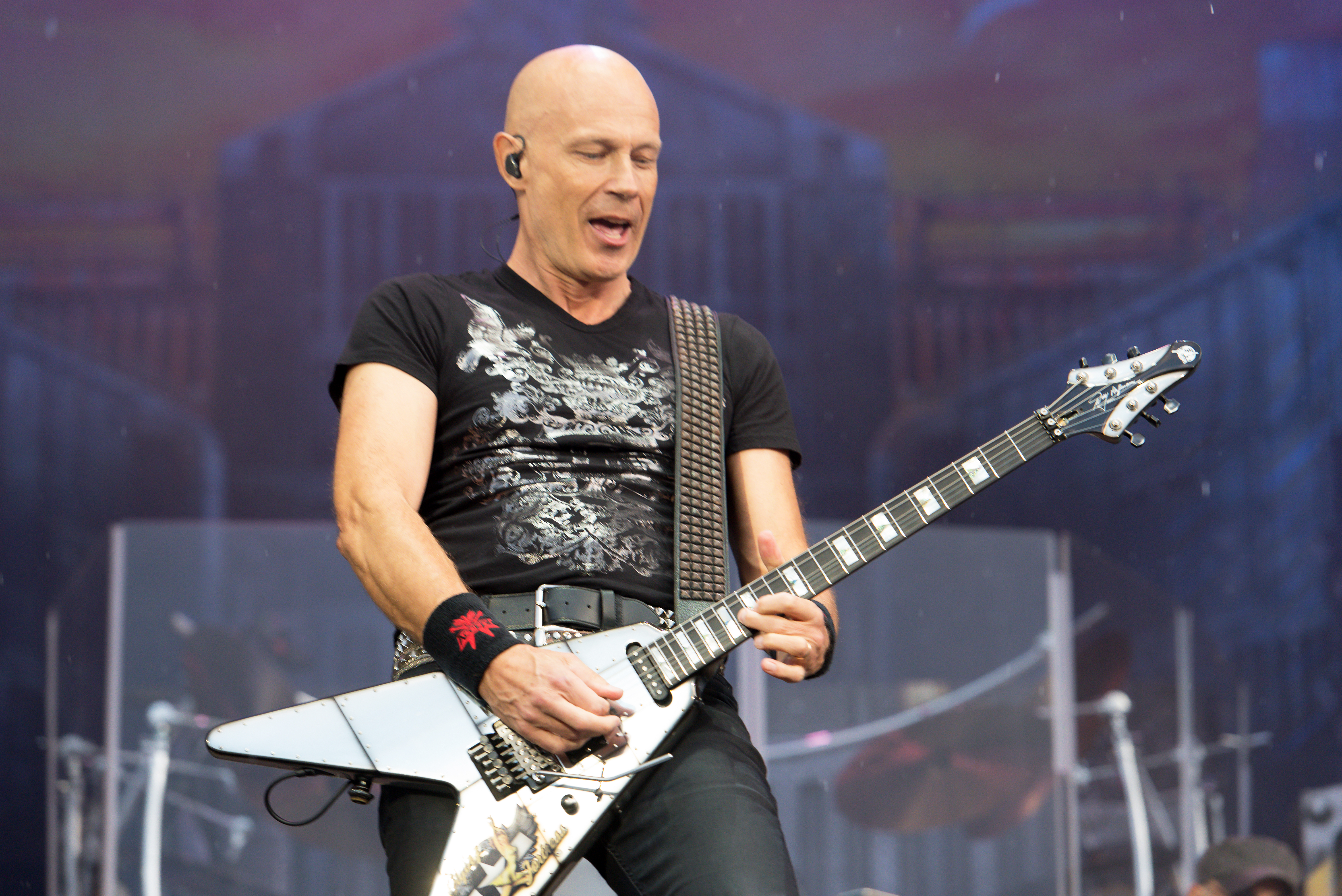 Accept beim Wacken Open Air 2017